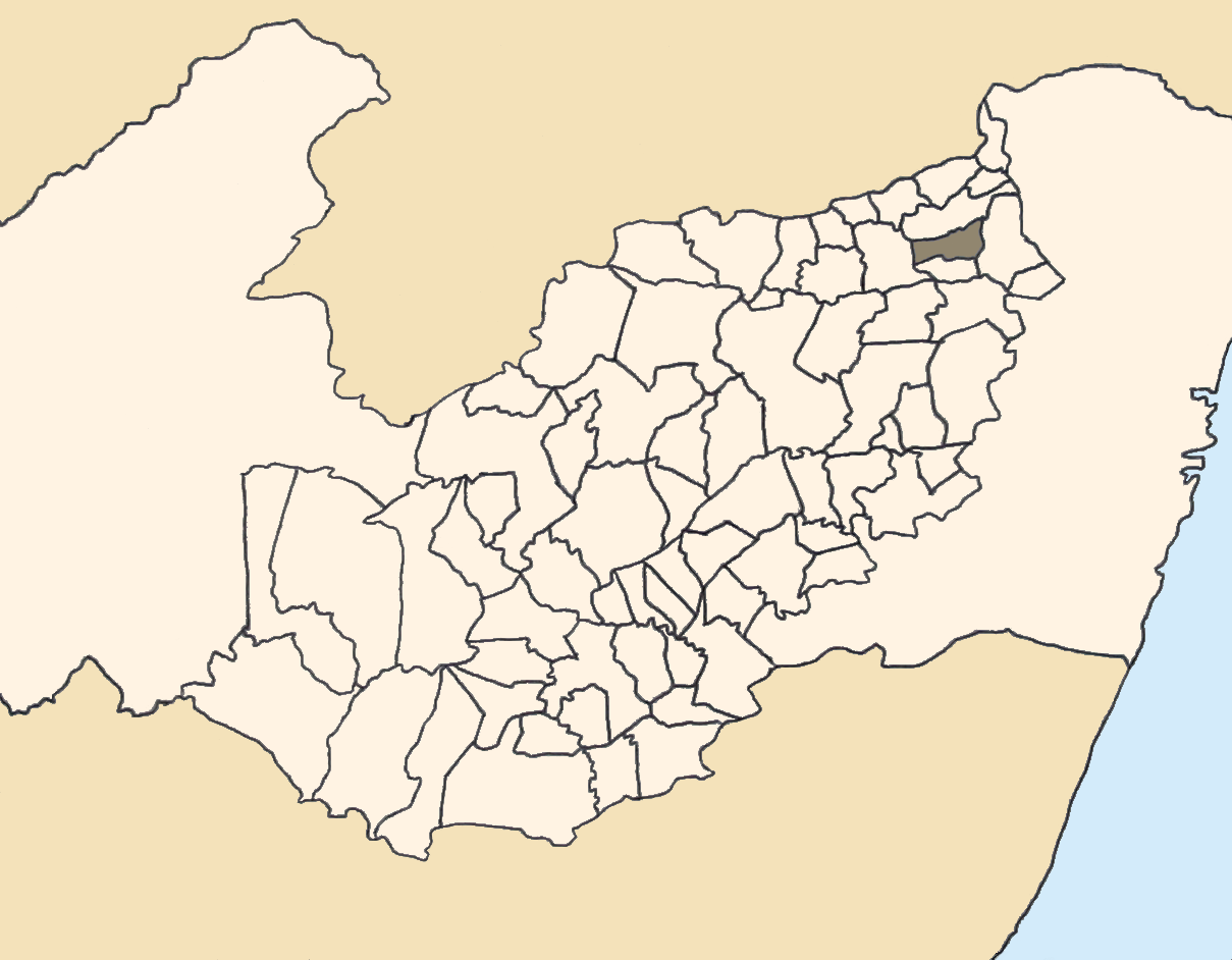 Mapa da mesorregião Agreste de Pernambuco (Brasil) subdivida em municípios. Em destaque, o município de João Alfredo. Map of the brazilian state of Pernambuco (mesorregião Agreste) showing the city of João Alfredo. Imagem tratada com o GIMP. Image made with GIMP.